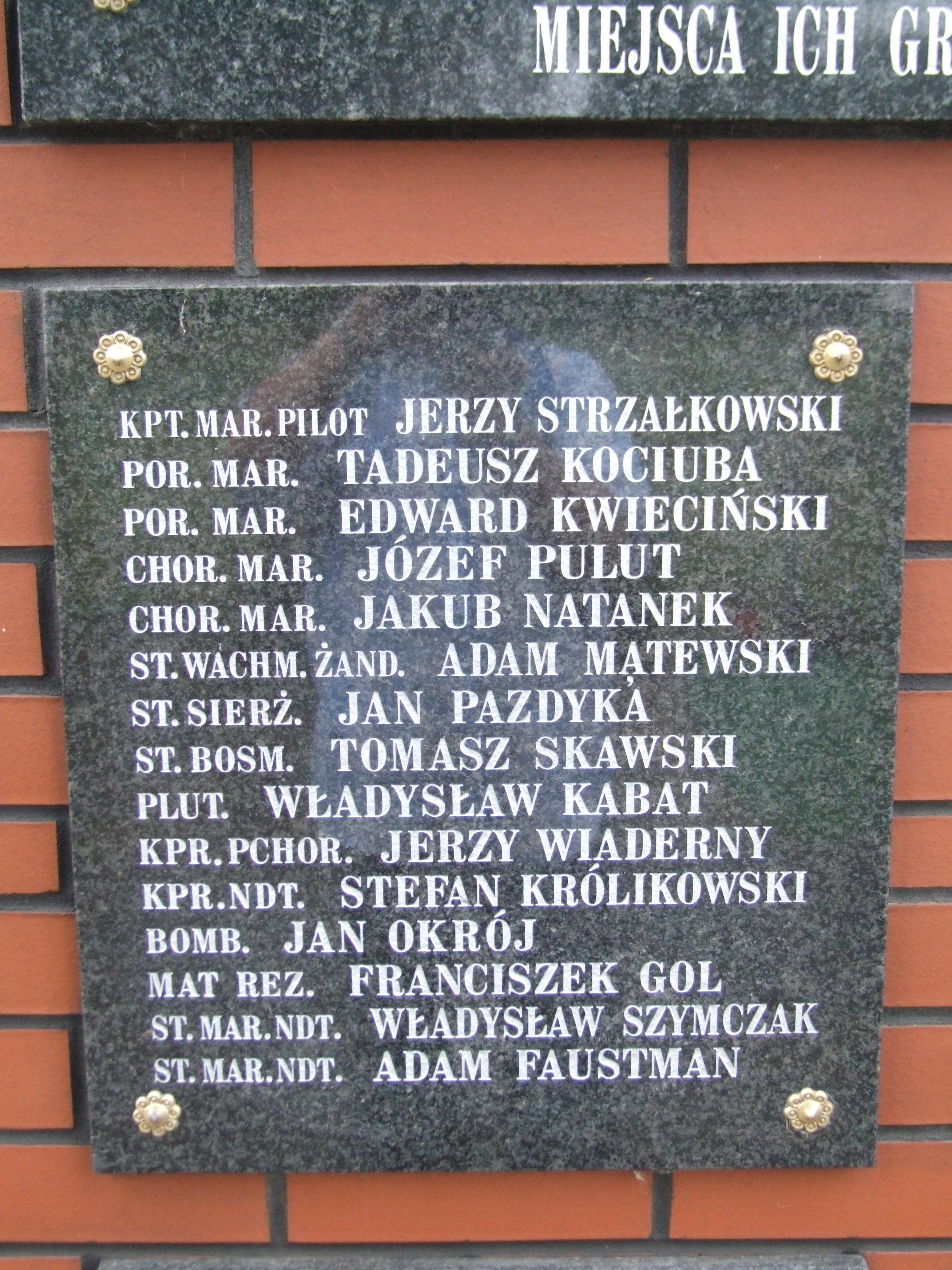 Gdynia-Oksywie Cmentarz Marynarki Wojennej